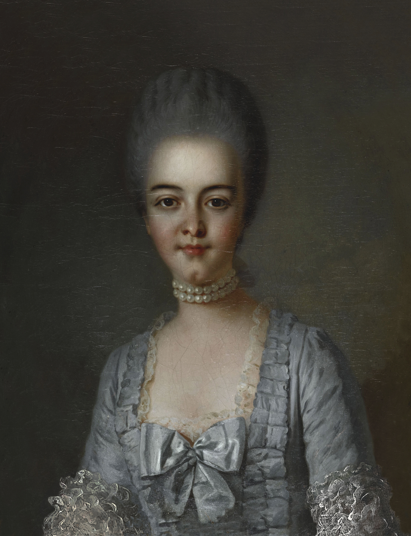 Portrait of Bathilde d'Orléans (1750-1822)